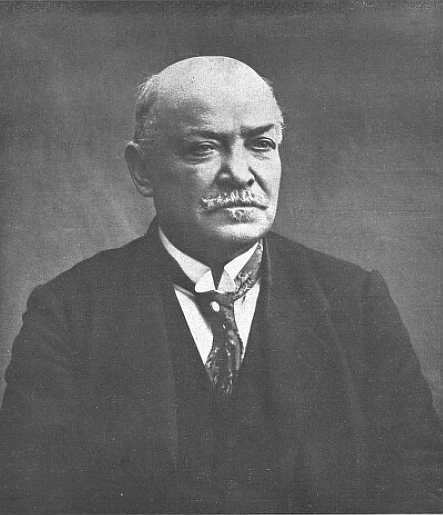 Augustin Eugen Mužík (před rokem 1925)